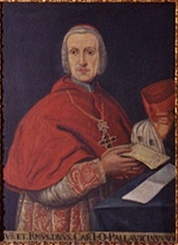 Cardinal Lazzaro Opizio Pallavicini, Kardinalstaatsekretär (1719-1785)